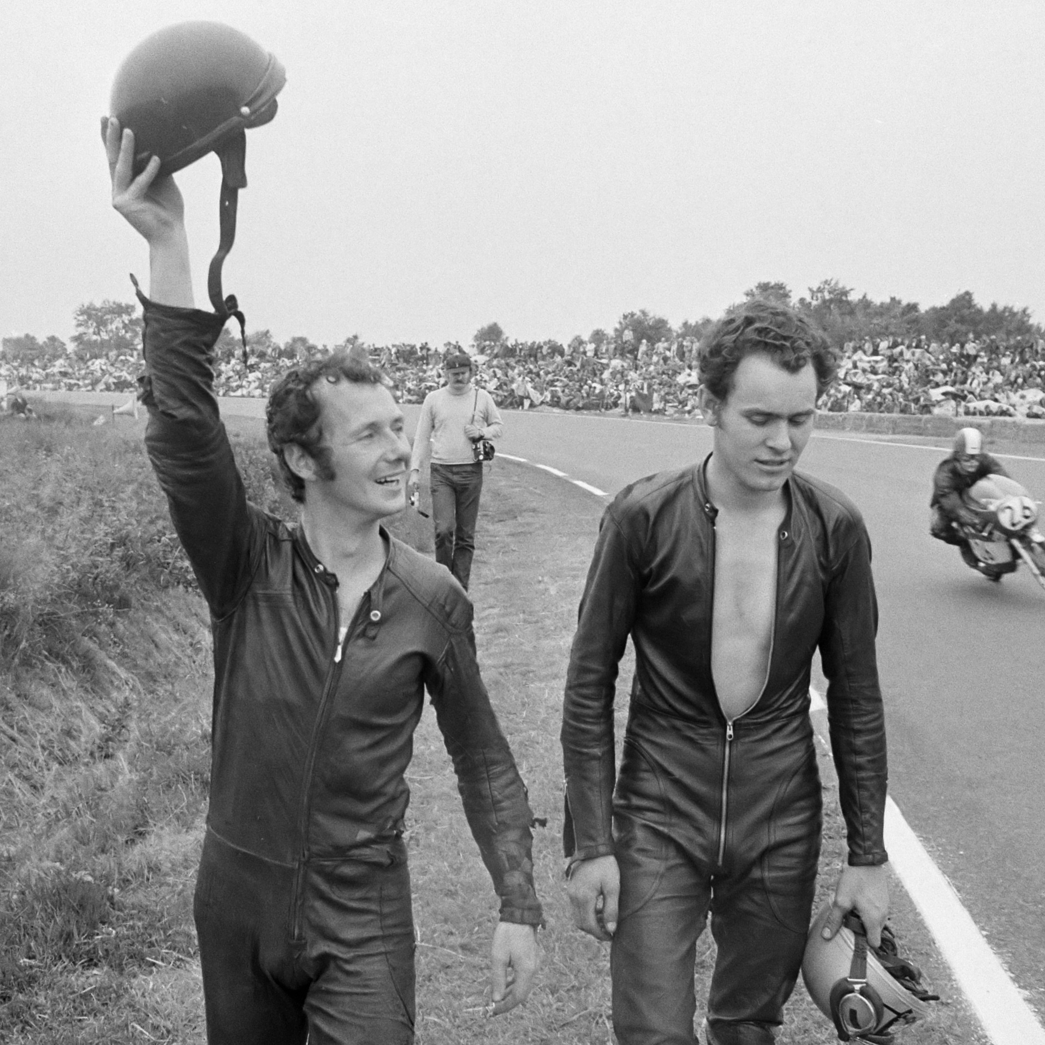 TT races Assen, links Jan de Vries , rechts Henk van Kessel lopen terug na valpartij. rechts passeert Ton Daleman 26 juni 1971